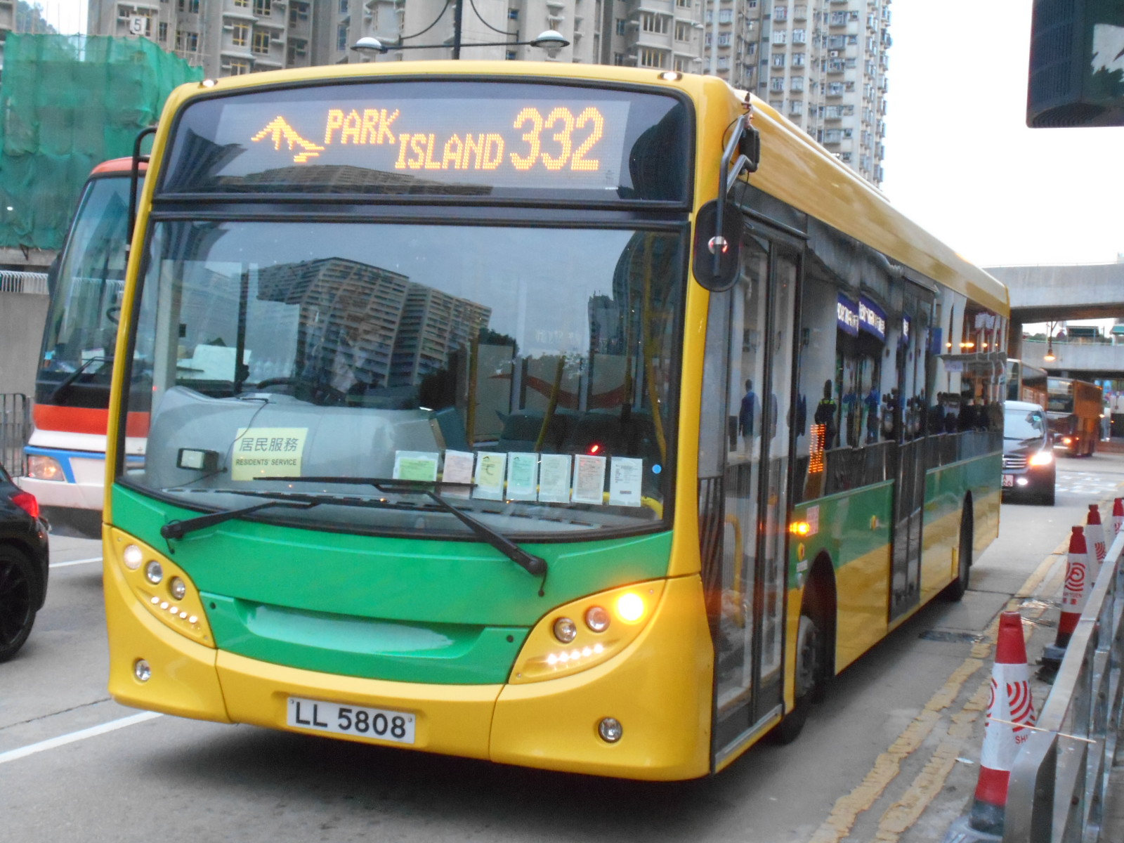 中文（香港）: 珀麗灣巴士NR332線，於2017年春季開始採用Enviro200行駛